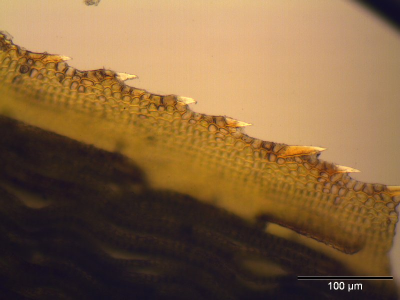 Zierliches Widertonmoos (Polytrichum longisetum), Blattrand bei 250-facher Vergrößerung